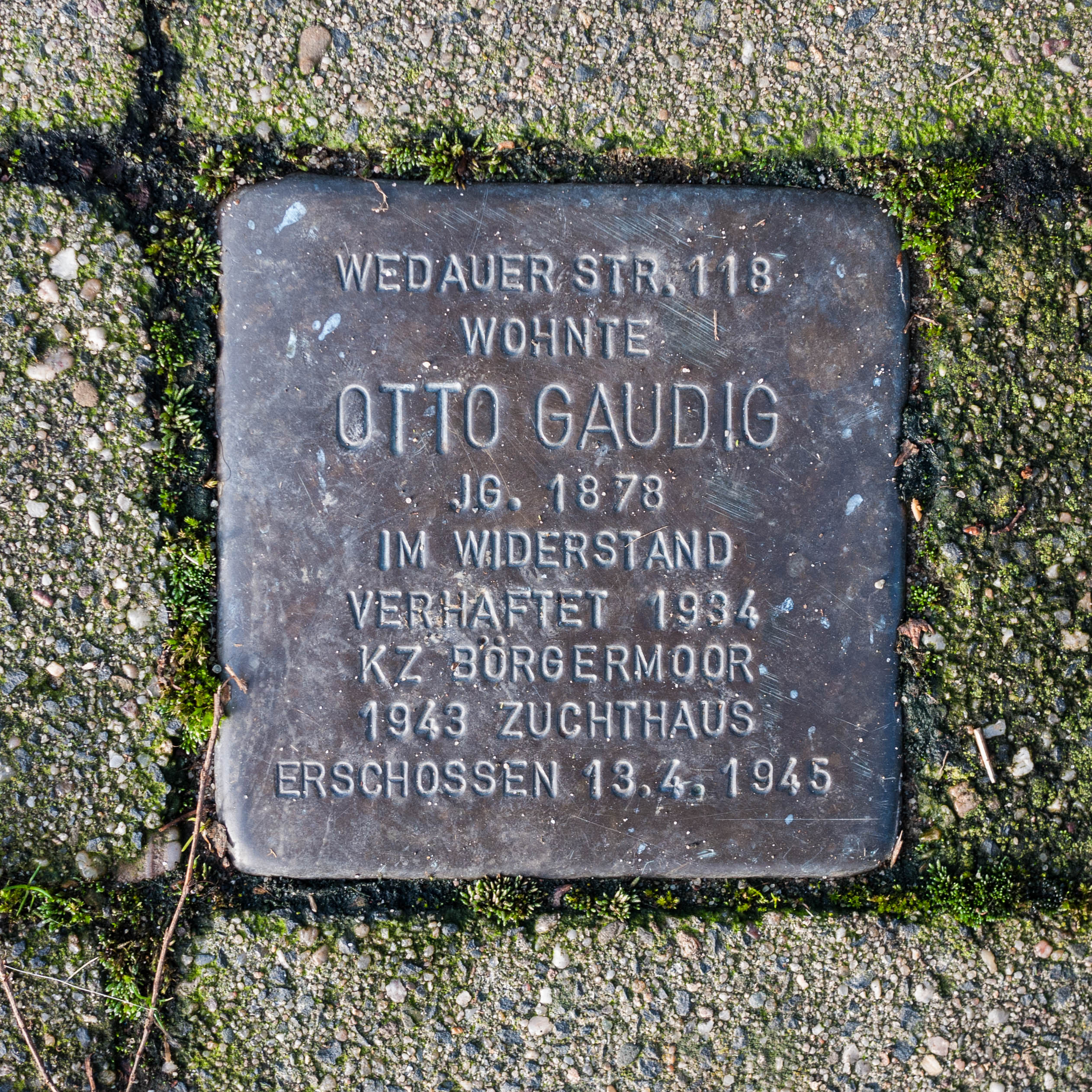 Stolperstein für Otto Gaudig, an der Wedauer Straße in Mülheim an der Ruhr (Info-Seite der Stadt MH)